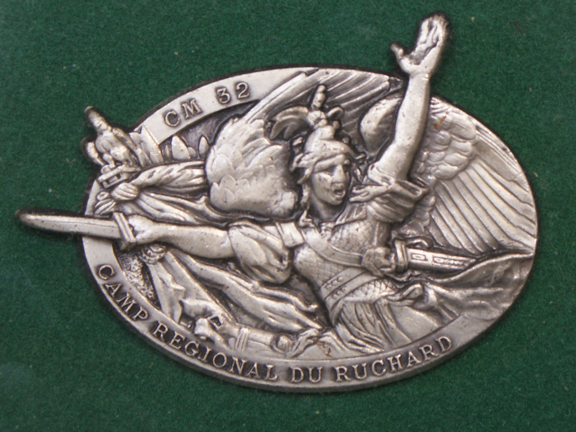 Insigne du camp du Ruchard (Chinon)